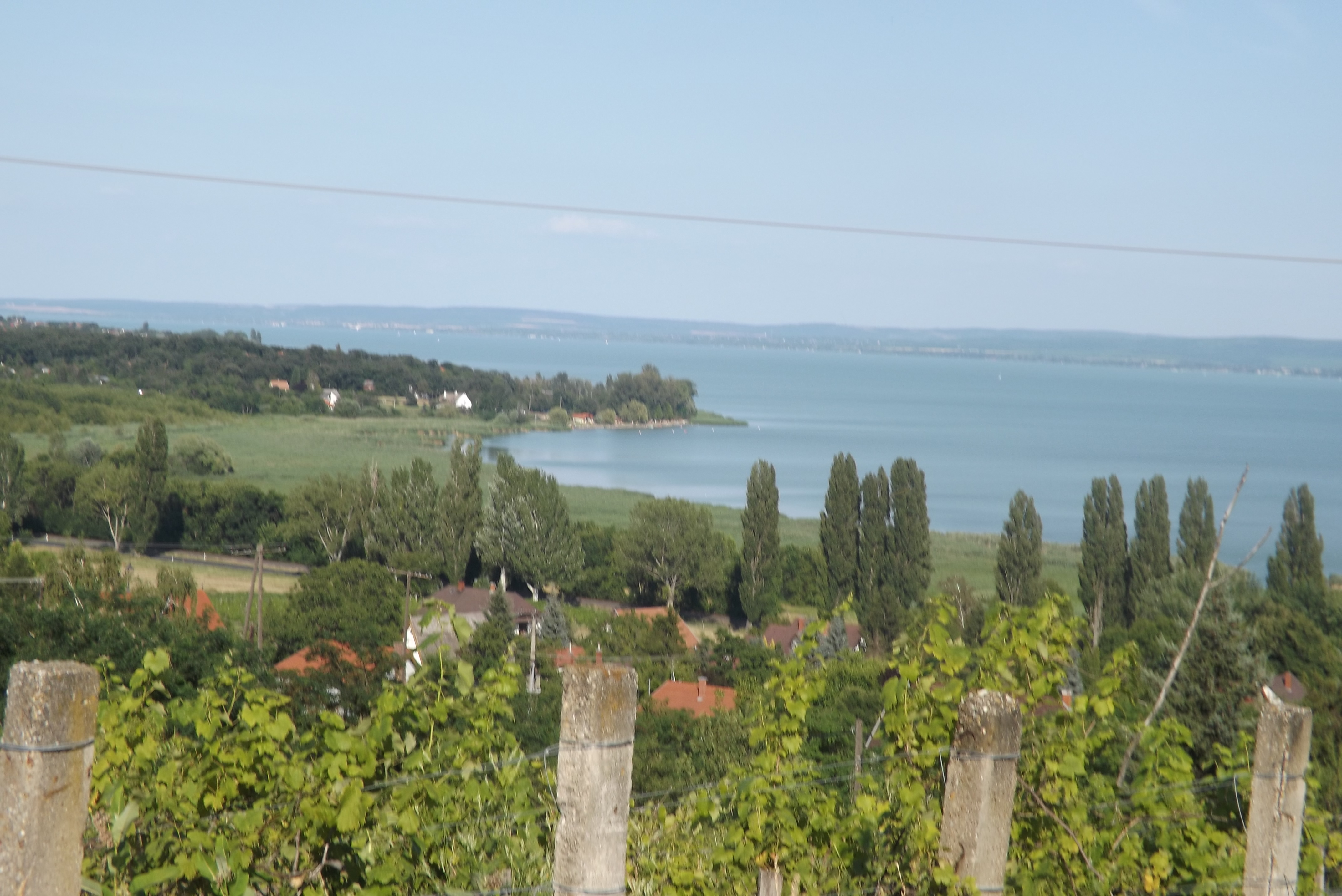 Kilátás a Balatonra, Ábrahámhegy